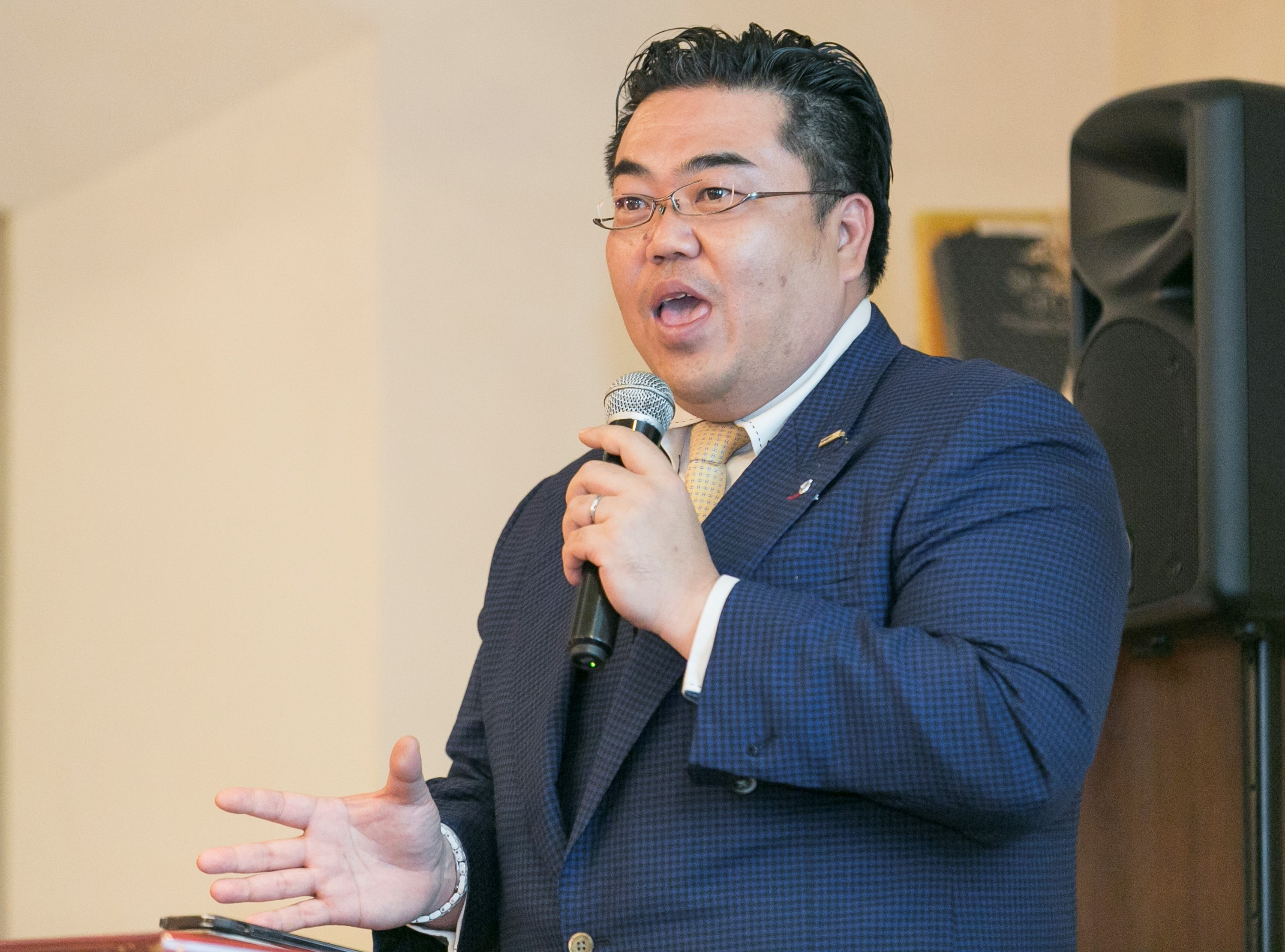 いちかわ しんじろう 市川 慎次郎氏 講演 生誕 1976年 埼玉県 出身校 清華大学 北京語言大学漢語学部経済貿易科 受賞 平成29年度「がん患者と仕事の両立への優良な取り組みを行う企業表彰」優良賞